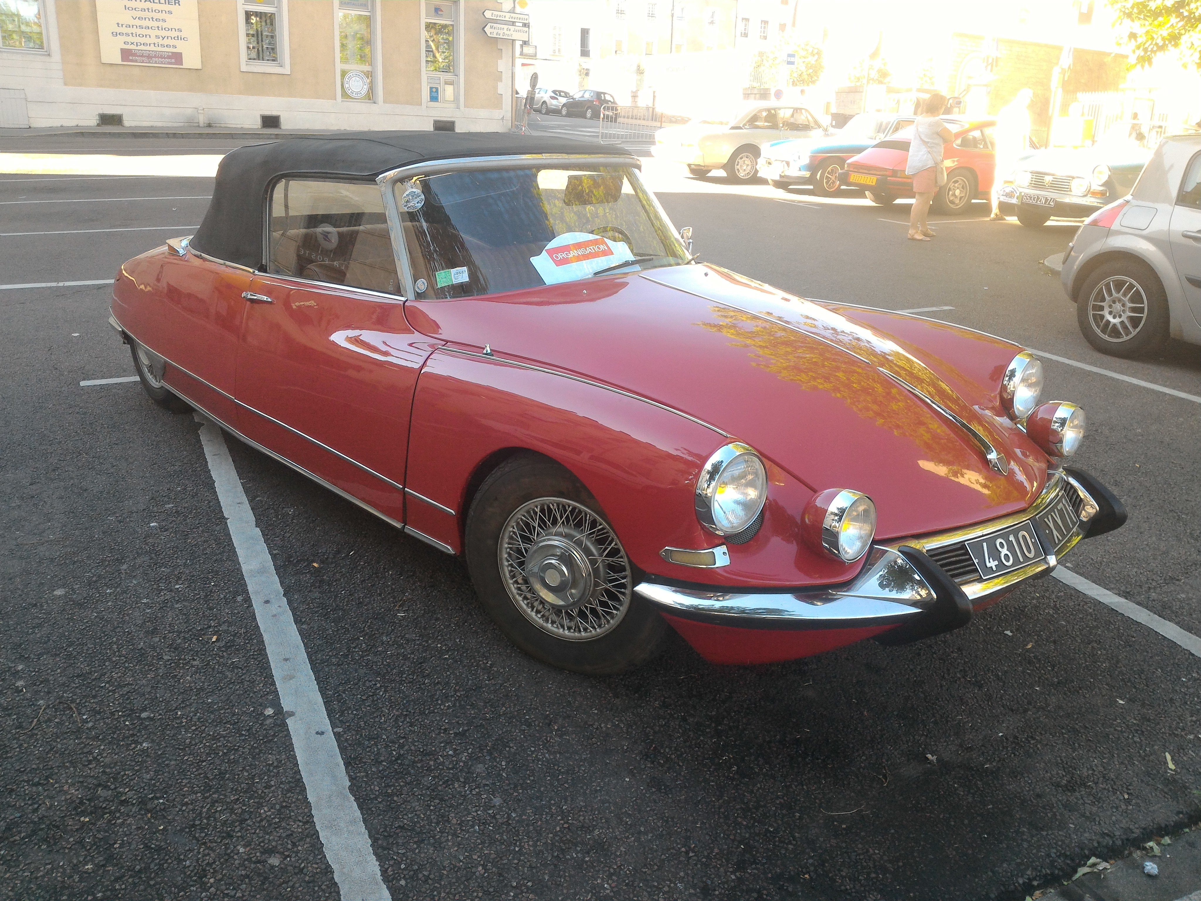 Citroen DS 21 Cabriolet at Chalon sur Saone